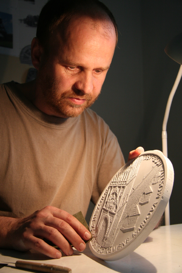 Zbyněk Fojtů při práci na návrhu zlaté medaile 650 let od založení Karlova mostu